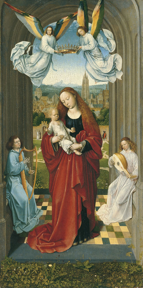 oil on panel